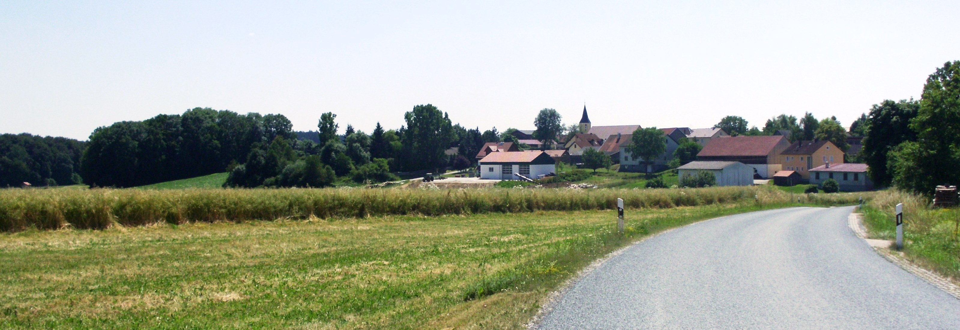 Ortsansicht von Hamberg, Landkreis Neumarkt i. d. Opf.